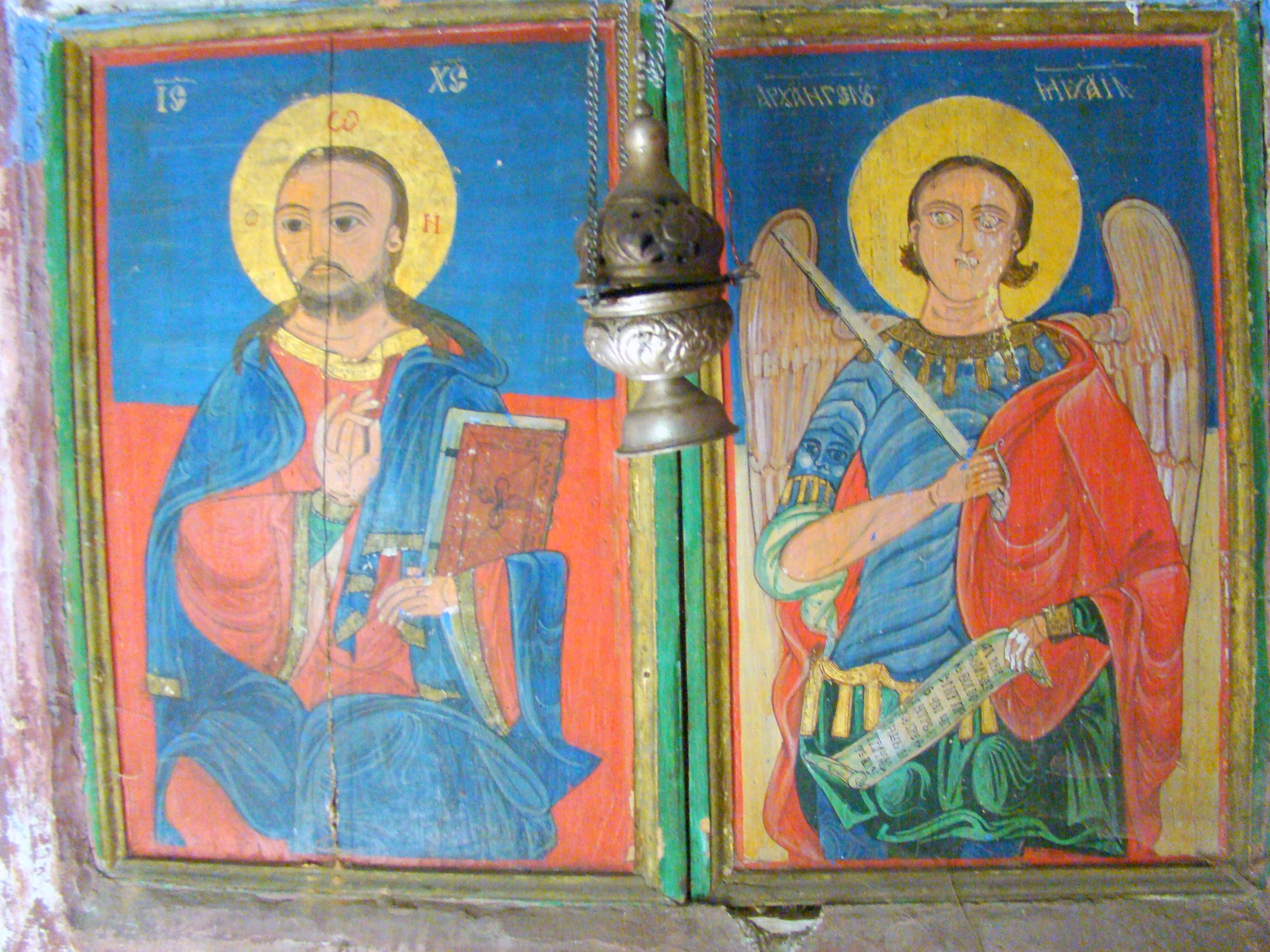 Biserica de lemn „Sfinții Voievozi” din Nistorești, județul Gorj